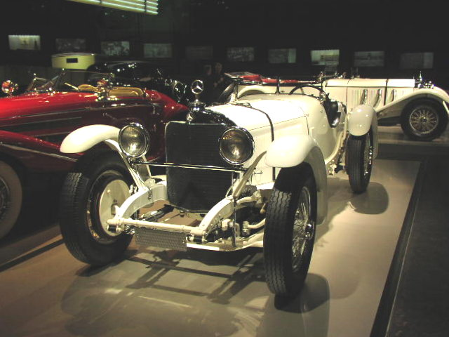 Mercedes-Benz 26/120/180 hp S-Type 1928